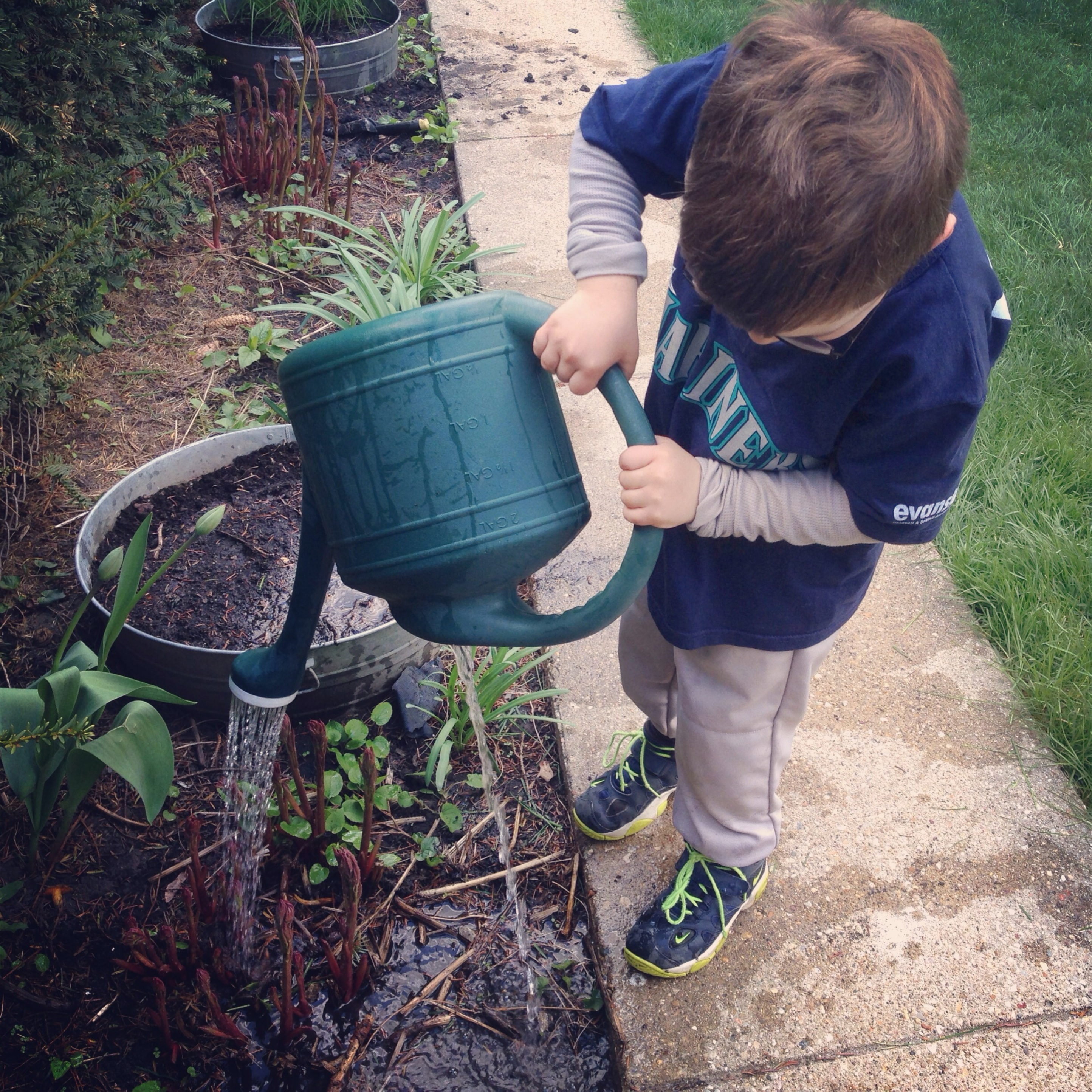 zdjęcie Ilustruje młodą dziewczynę w wieku gimnazjalistki zajmującą się pielęgnowaniem roślin w ogródku (ujęcie wykonane w sposób uniemożliwiający rozpoznanie twarzy) English | Polski | +/−